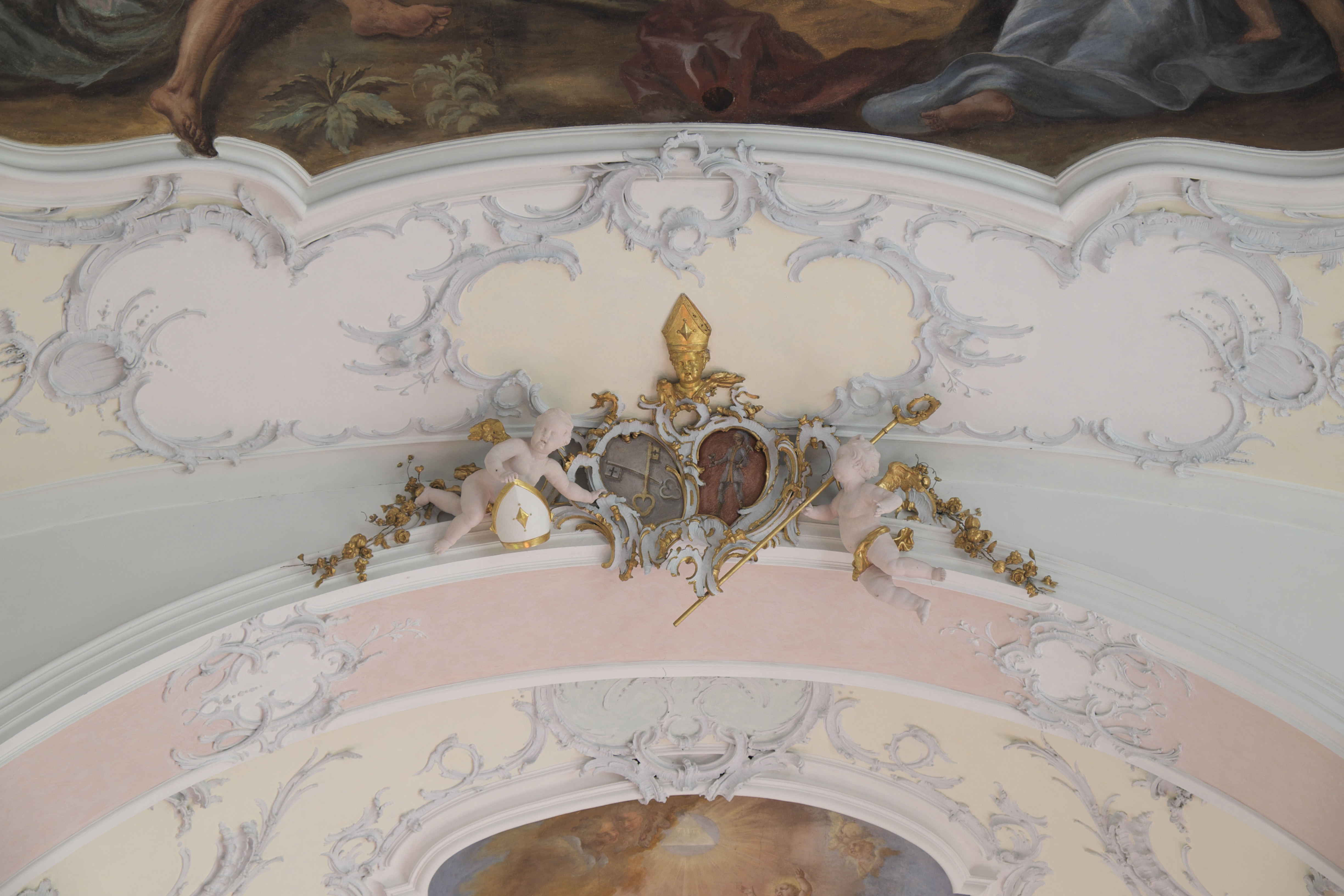 Katholische Pfarrkirche St. Johannes Baptist in Wessobrunn im Landkreis Weilheim-Schongau (Bayern/Deutschland), Stuck von Tassilo Zöpf, Wappen des Abtes Beda Schallhammer am Chorbogen